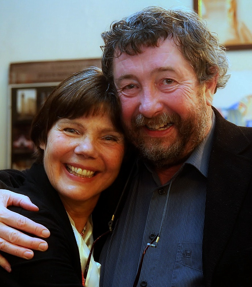 Sugár Miklós és felesége, Mindszenty Zsuzsánna, 2014